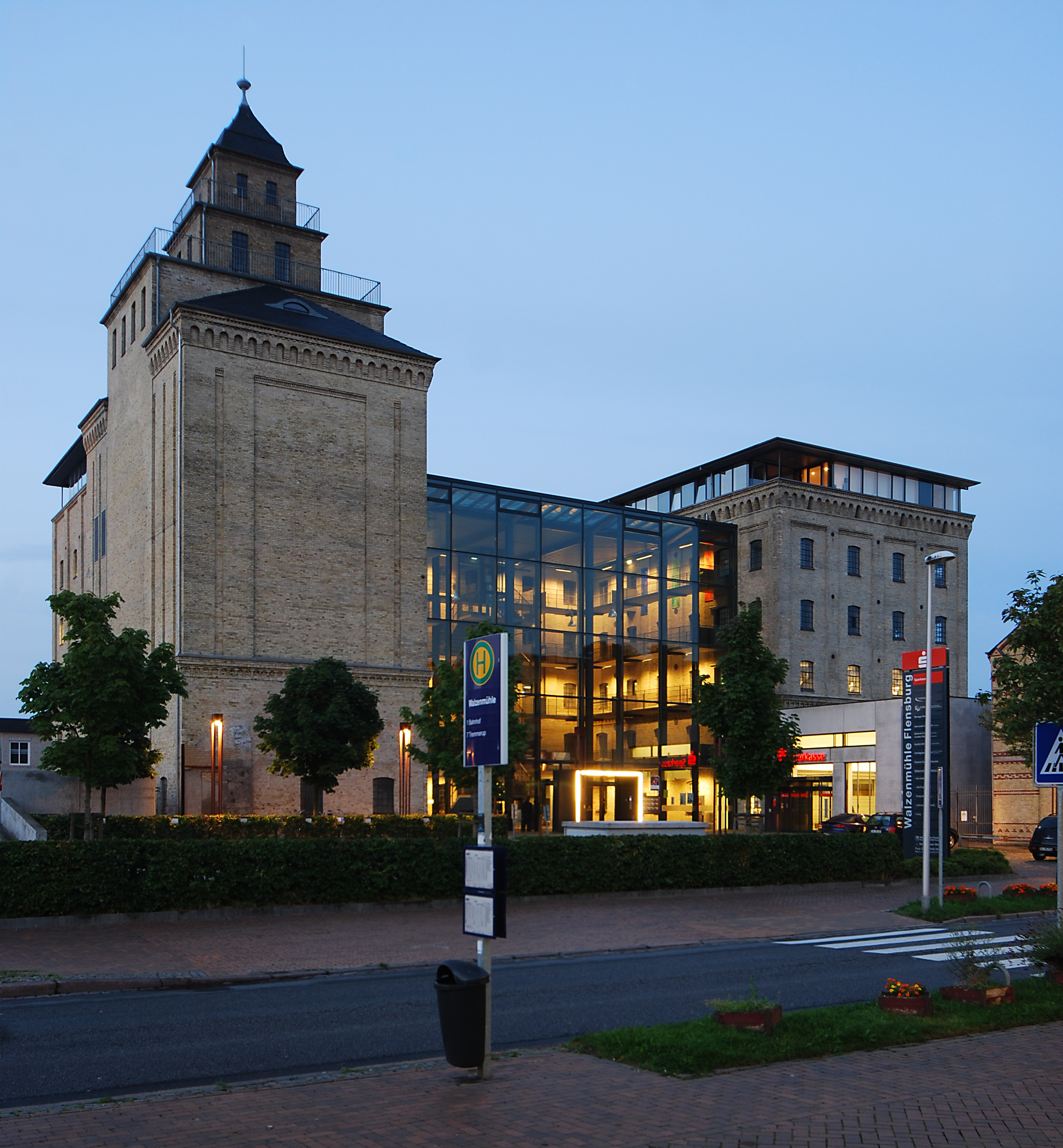 Walzenmühle an der Straße Neustadt im Stadtteil Neustadt der kreisfreien Stadt Flensburg in Schleswig-Holstein